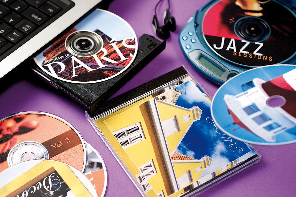 Gama de productos multimedia, APLI PAPER S.A.